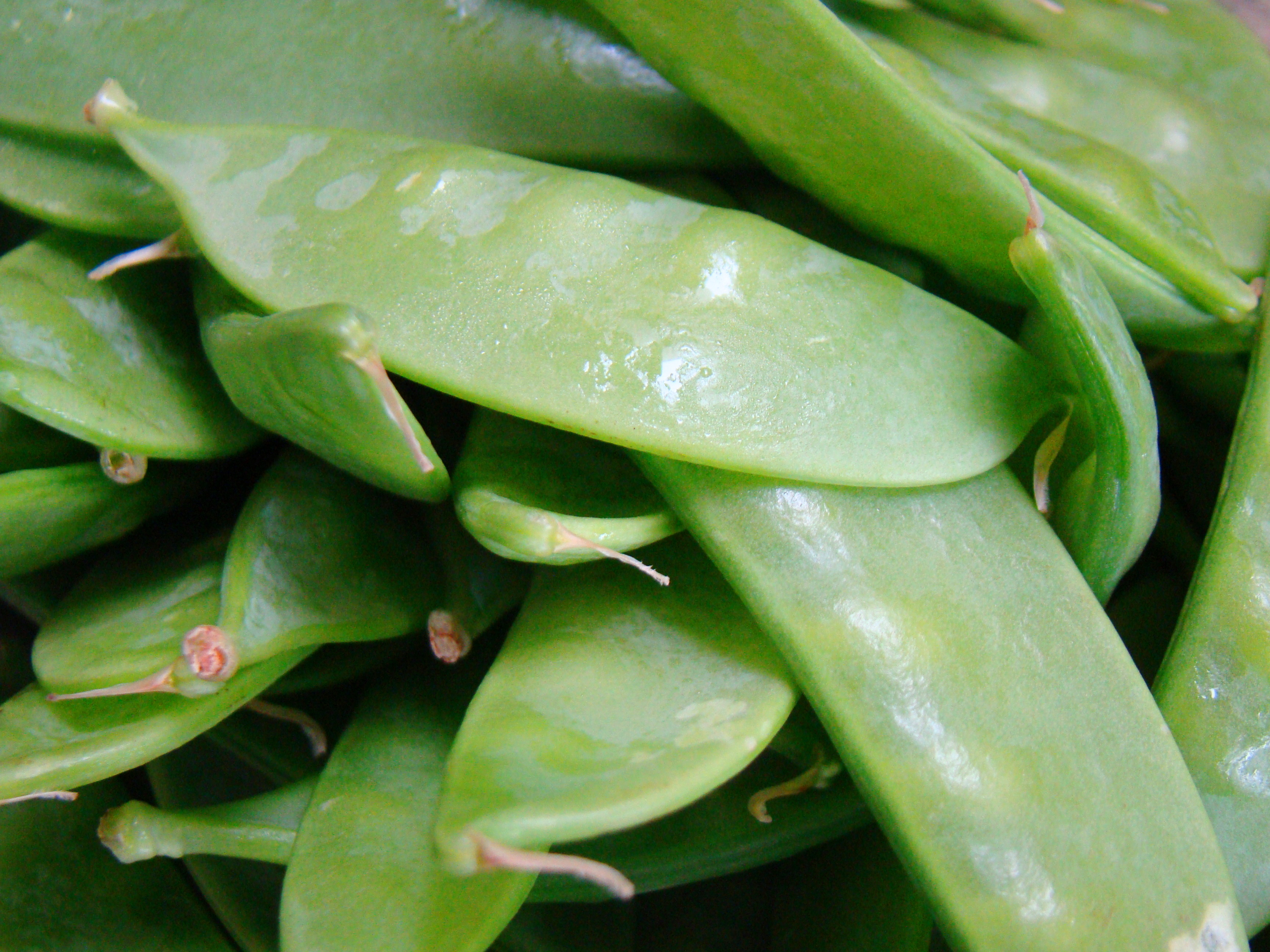 Snow Pea